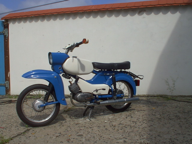 SR4-3_(Sperber)